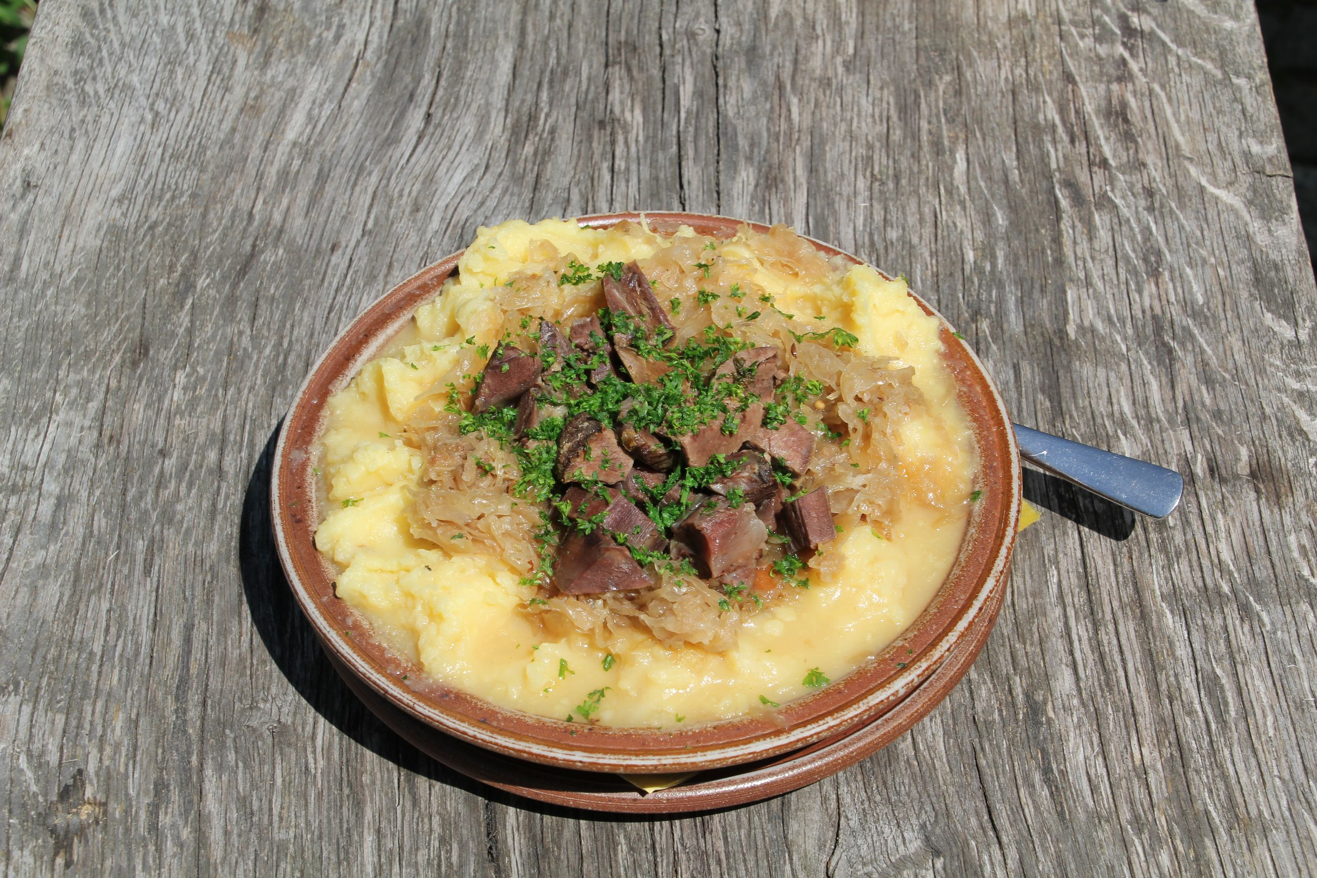 Teichelmauke